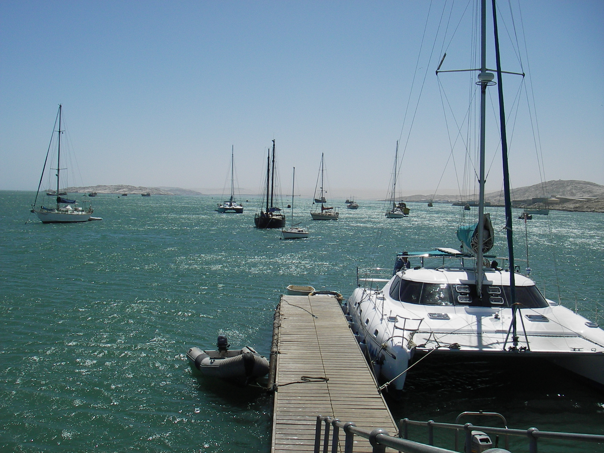 Roberthafen in Luederitz, Pinguininsel links im Hintergrund, Nautilusberg rechts im Hintergrund harbour in Lüderitz